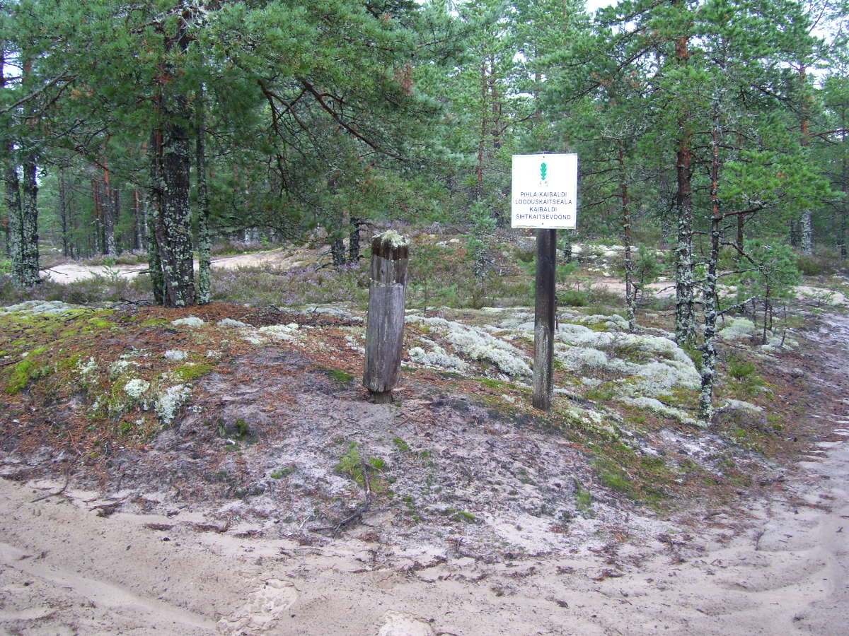 Pihla-Kaibaldi looduskaitseala, Kaibaldi sihtkaitsevööndi piir Kanapeeksi-Kaibaldi metsatee ääres